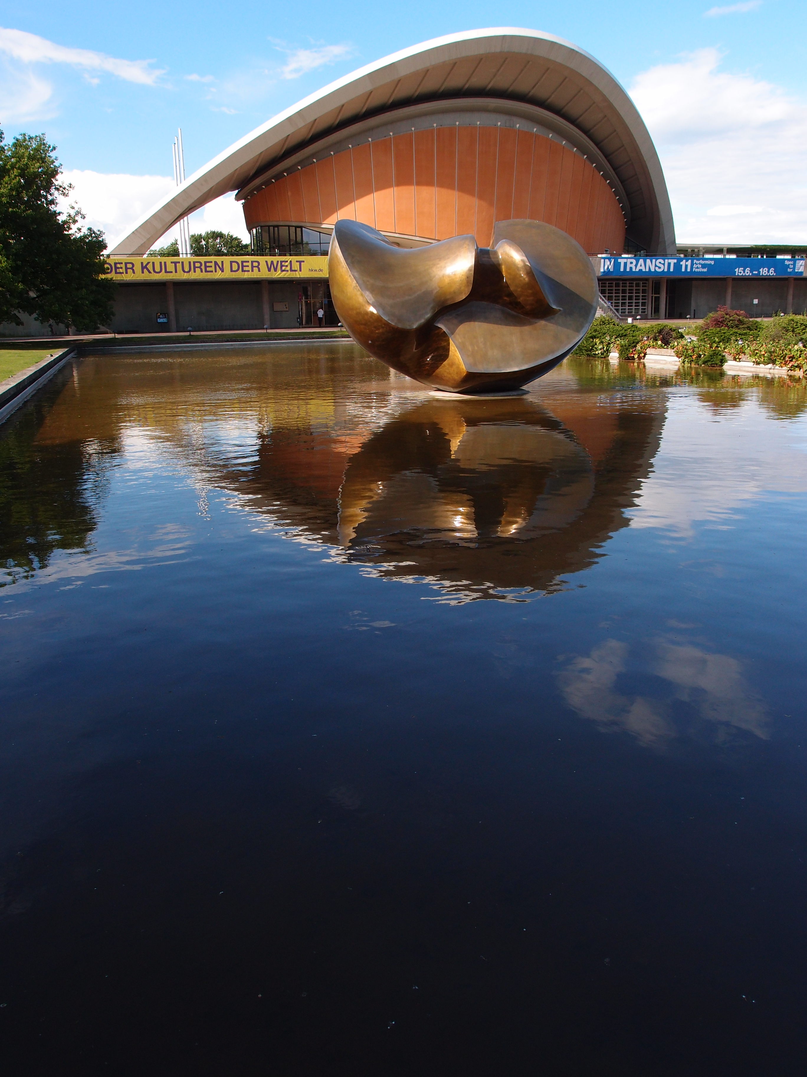 Berlin, Haus der Kulturen ("Schwangere Auster")